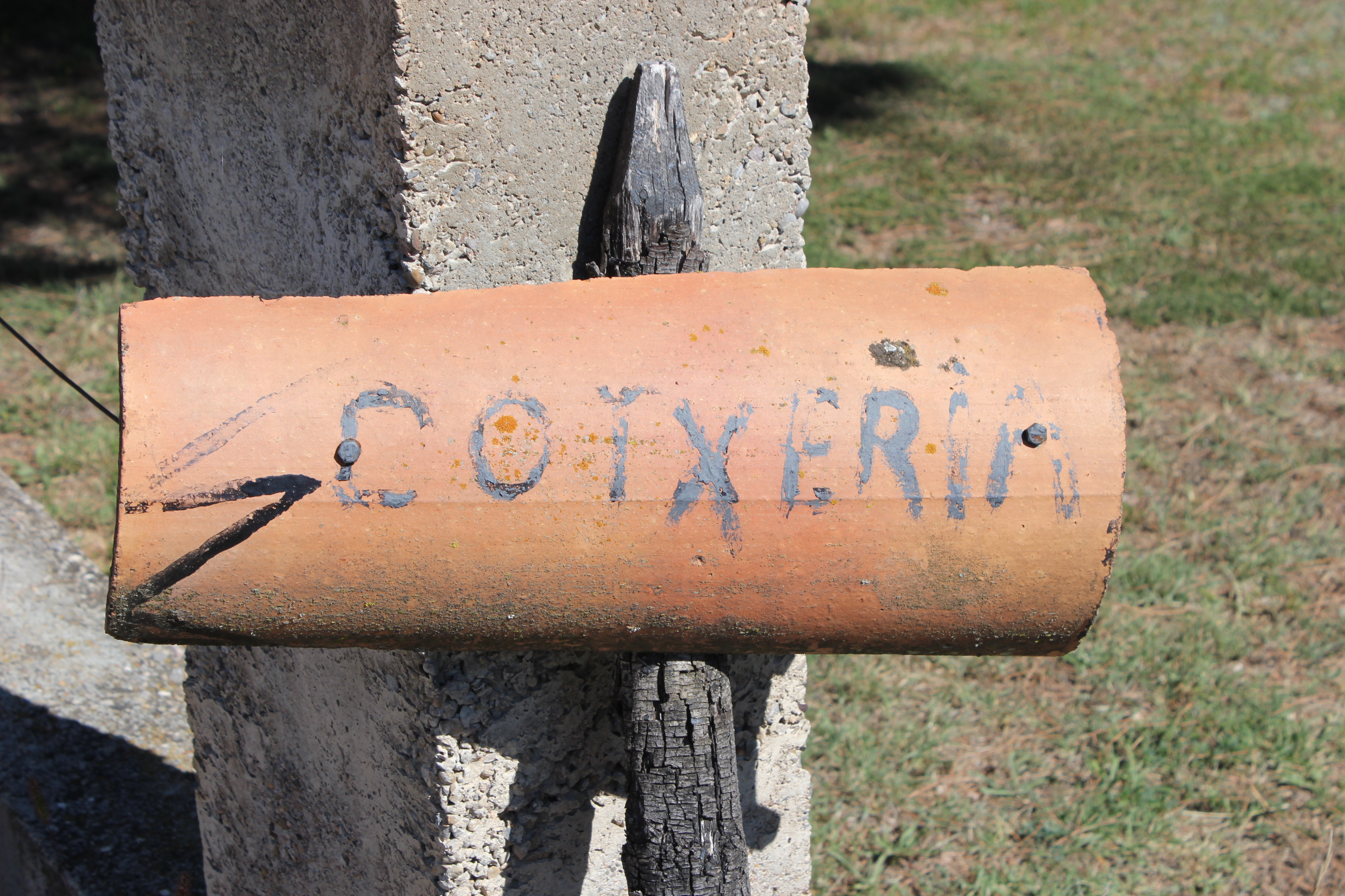 Teula que fa les funcions d'indicador de la Cotxeria